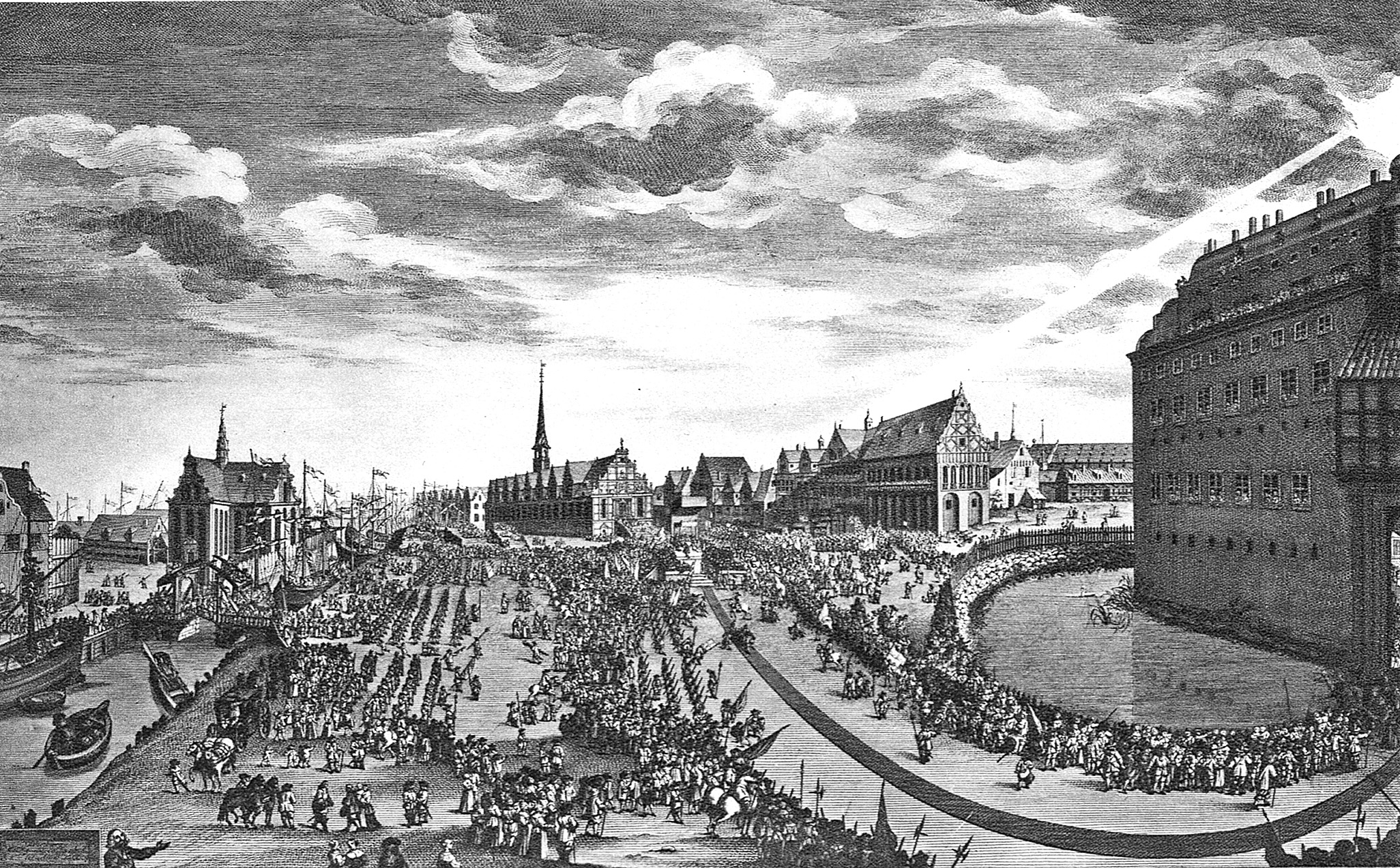 Arvehyldningen 1660